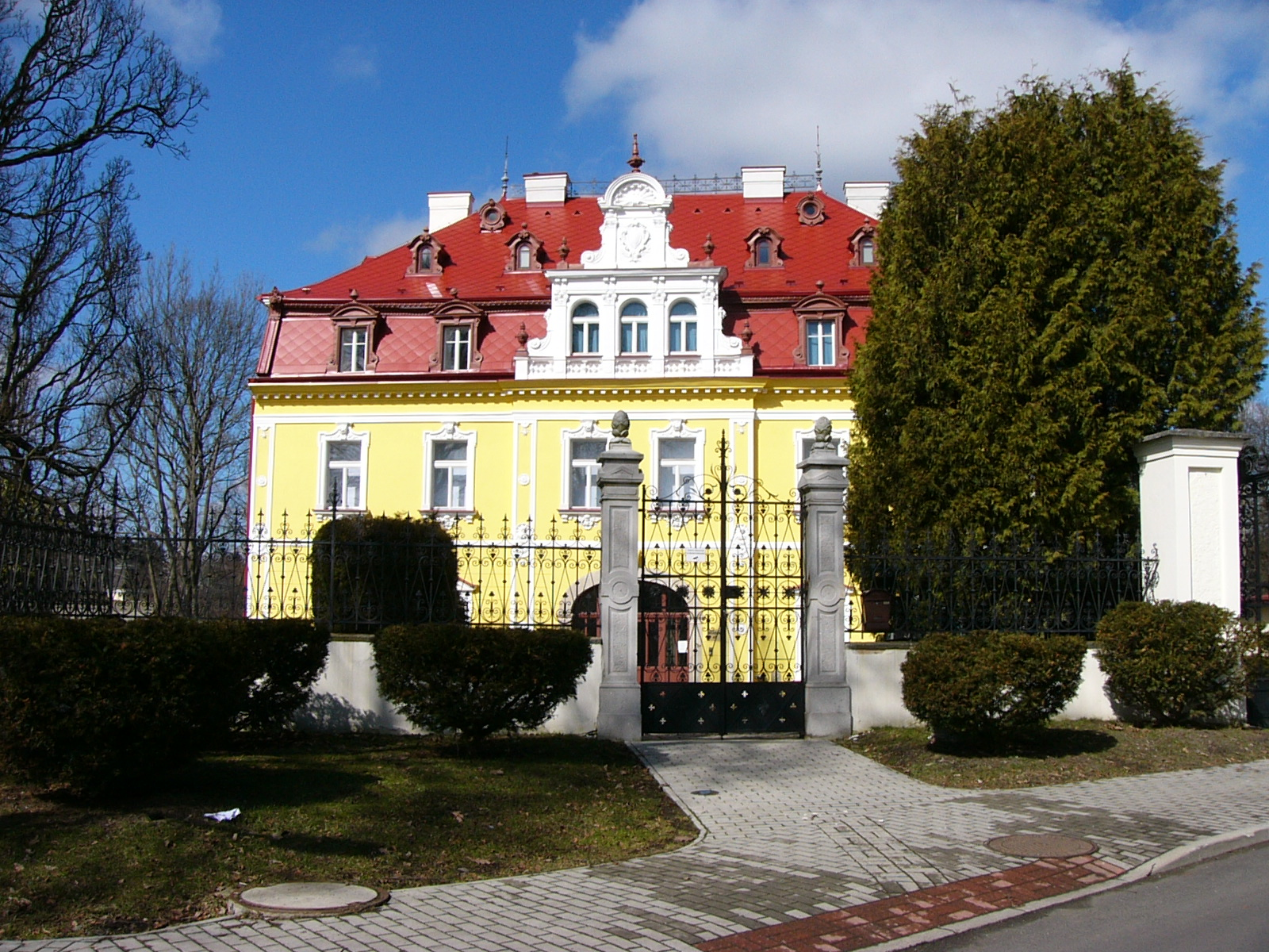 Museum von Asch